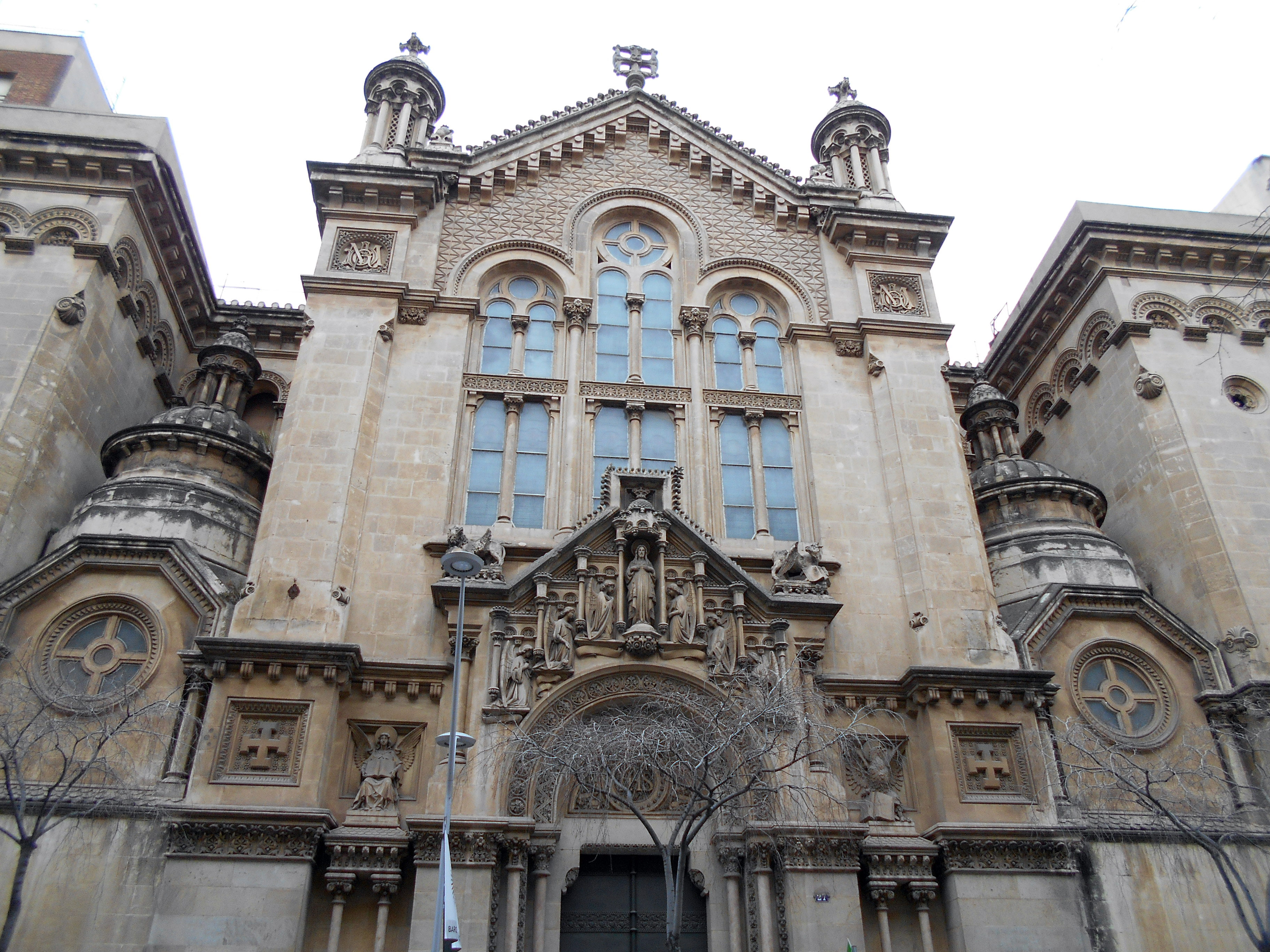 Iglesia del Sagrado Corazón de los jesuitas de la calle Caspe (1883-1889), de Joan Martorell, Barcelona.